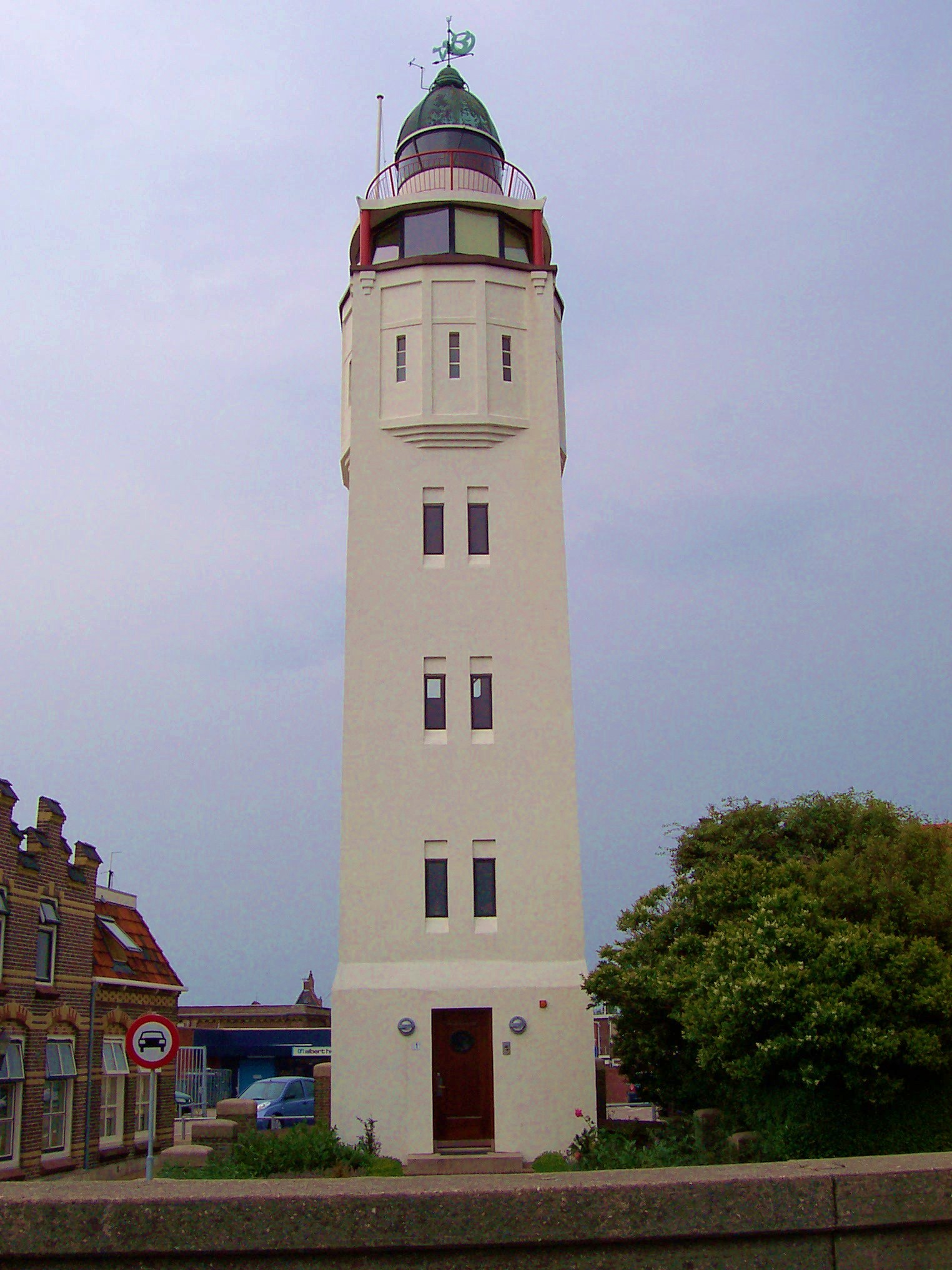 Harlingen - Feuerturm